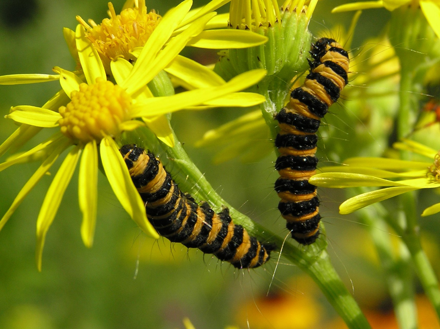 Tyria jacobaeae